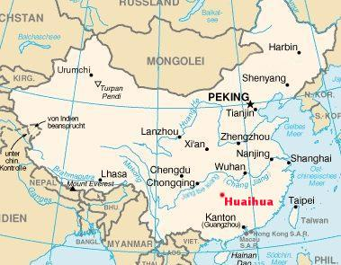 Lage der Stadt Huaihua Als Bild wurde von Bild:Changchun Lage.jpg genommen und der Punkt versetzt.